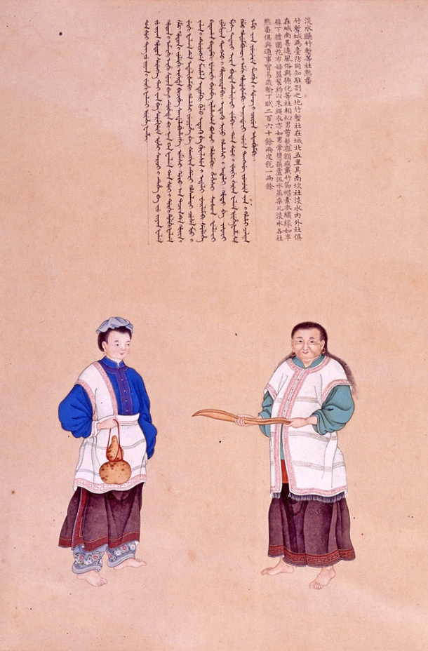 中文（香港）: 清 謝遂 職貢圖